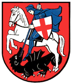 Blazon of Kaltbrunn, Canton of St. Gallen - Blazono de Kaltbrunn, Kantono de Sankt-Galo